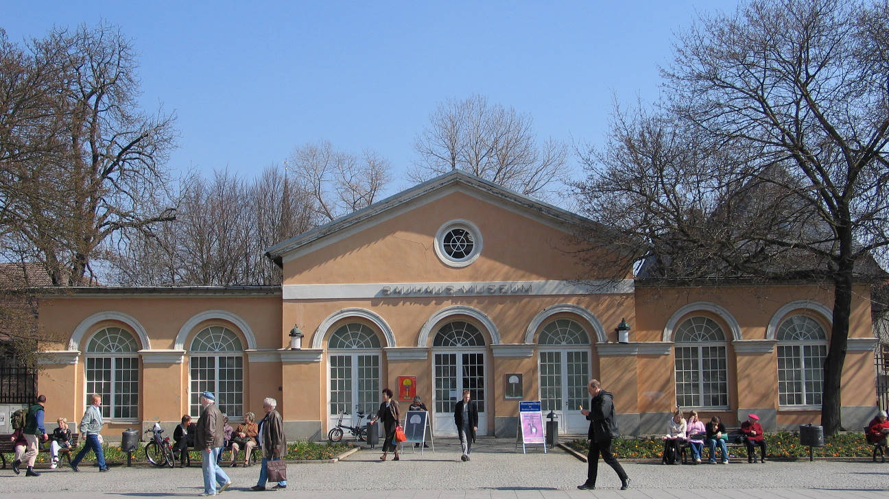 Wagenremise, heutiges Bauhausmuseum in Weimar.